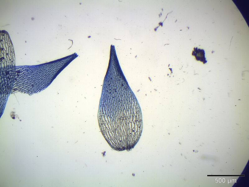 Sphagnum subnitens, Astblatt, 40x